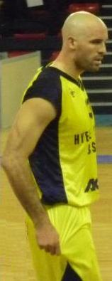 Vincent Masingue pendant le Championnat de Pro A contre l'ASVEL en janvier 2009